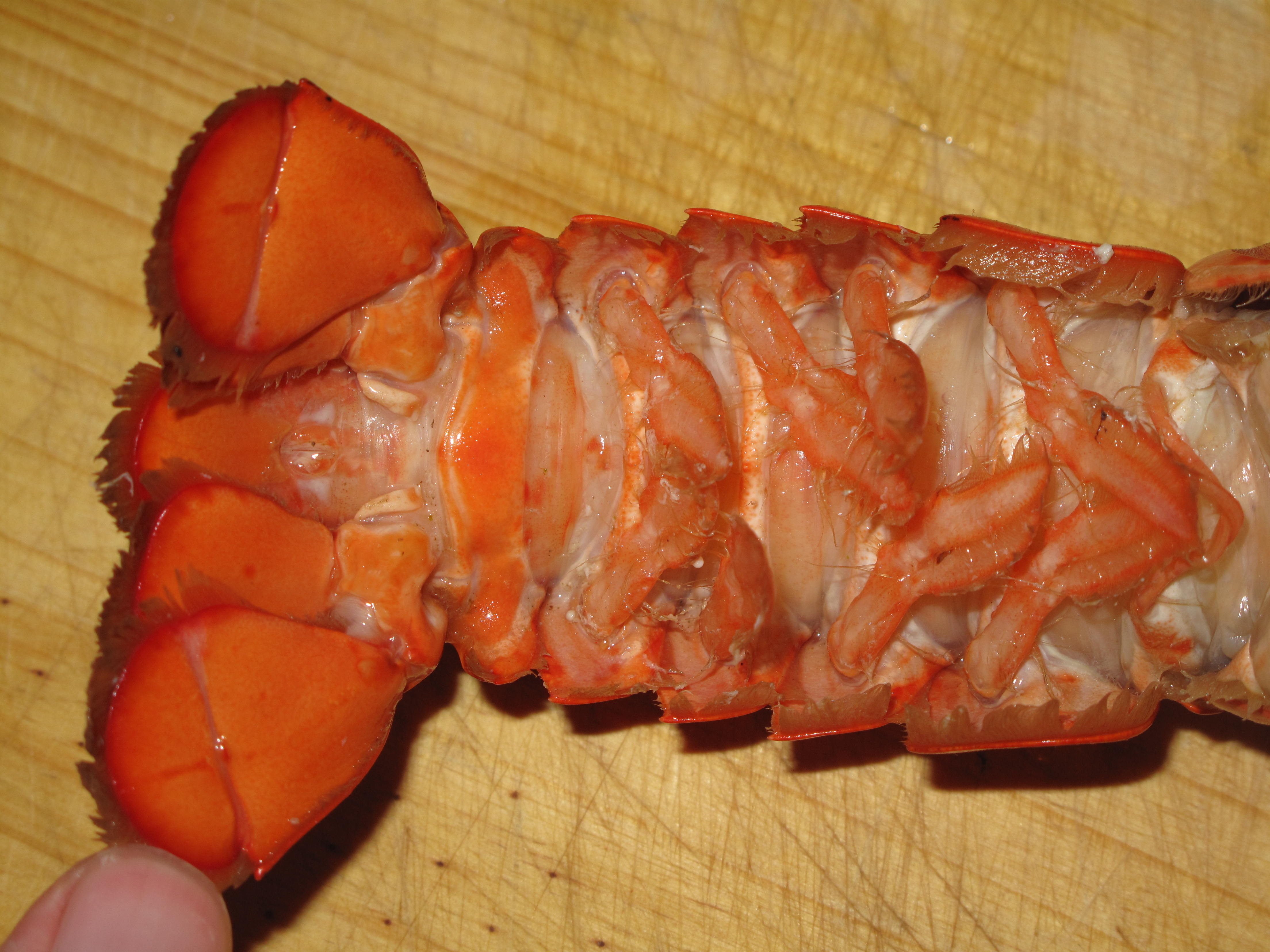 Humr